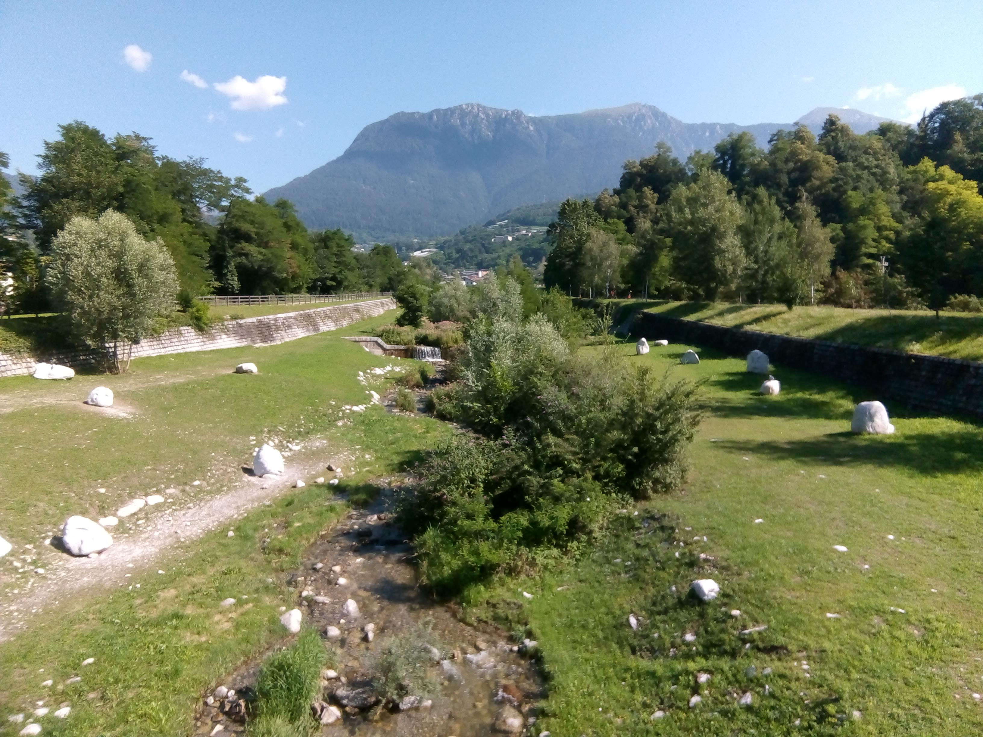 Torrente Chieppena, verso nord, dal ponte di Villa